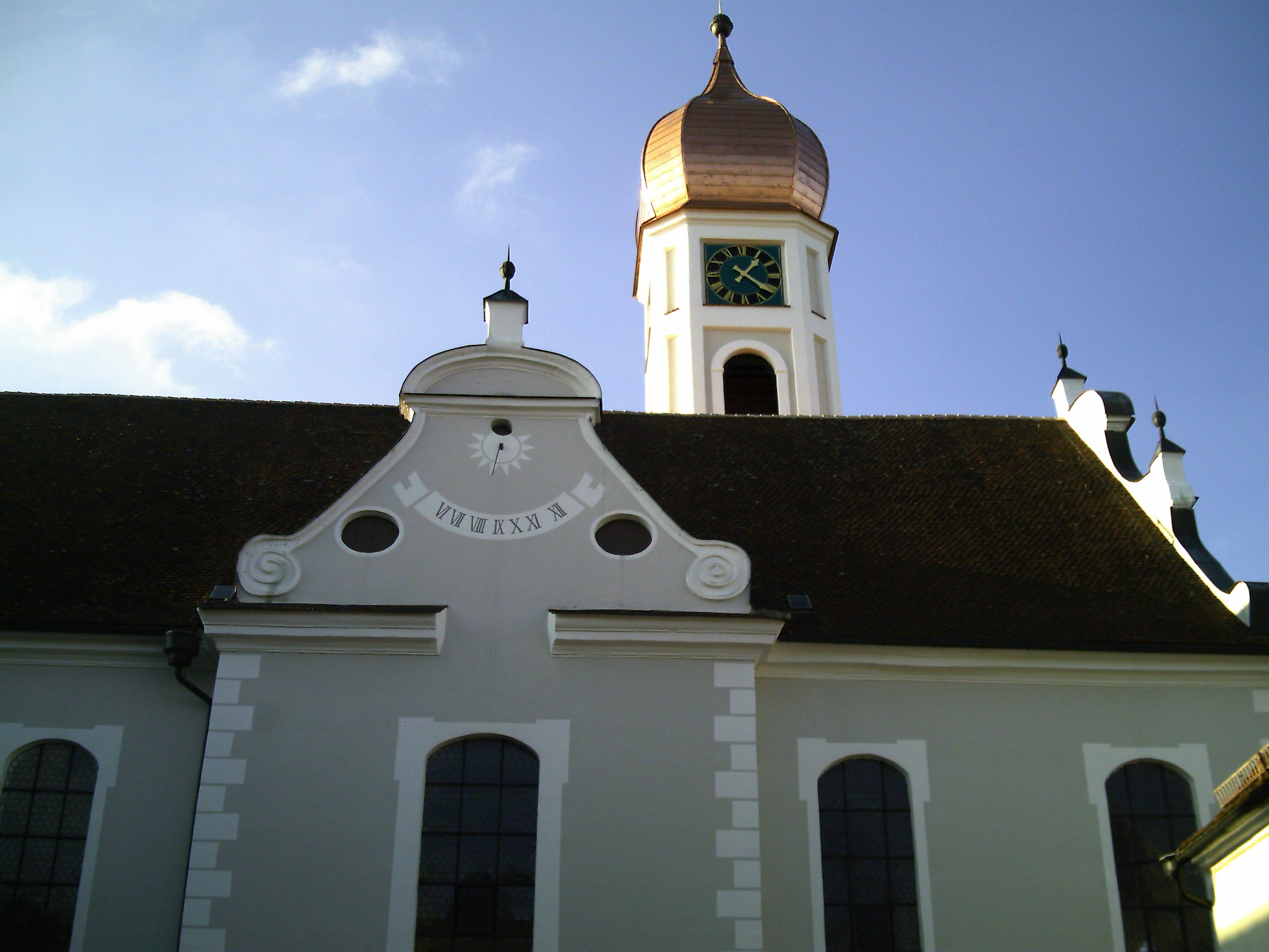 Röm.-Kath. Kirche St. Martin in 88459 Tannheim, Baden-Württemberg, Deutschland, Ostfront